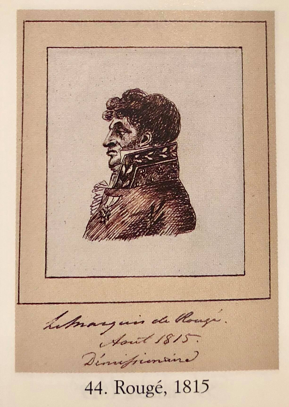 Caricature de Bonabes Louis Victurnien Alexis de Rougé.